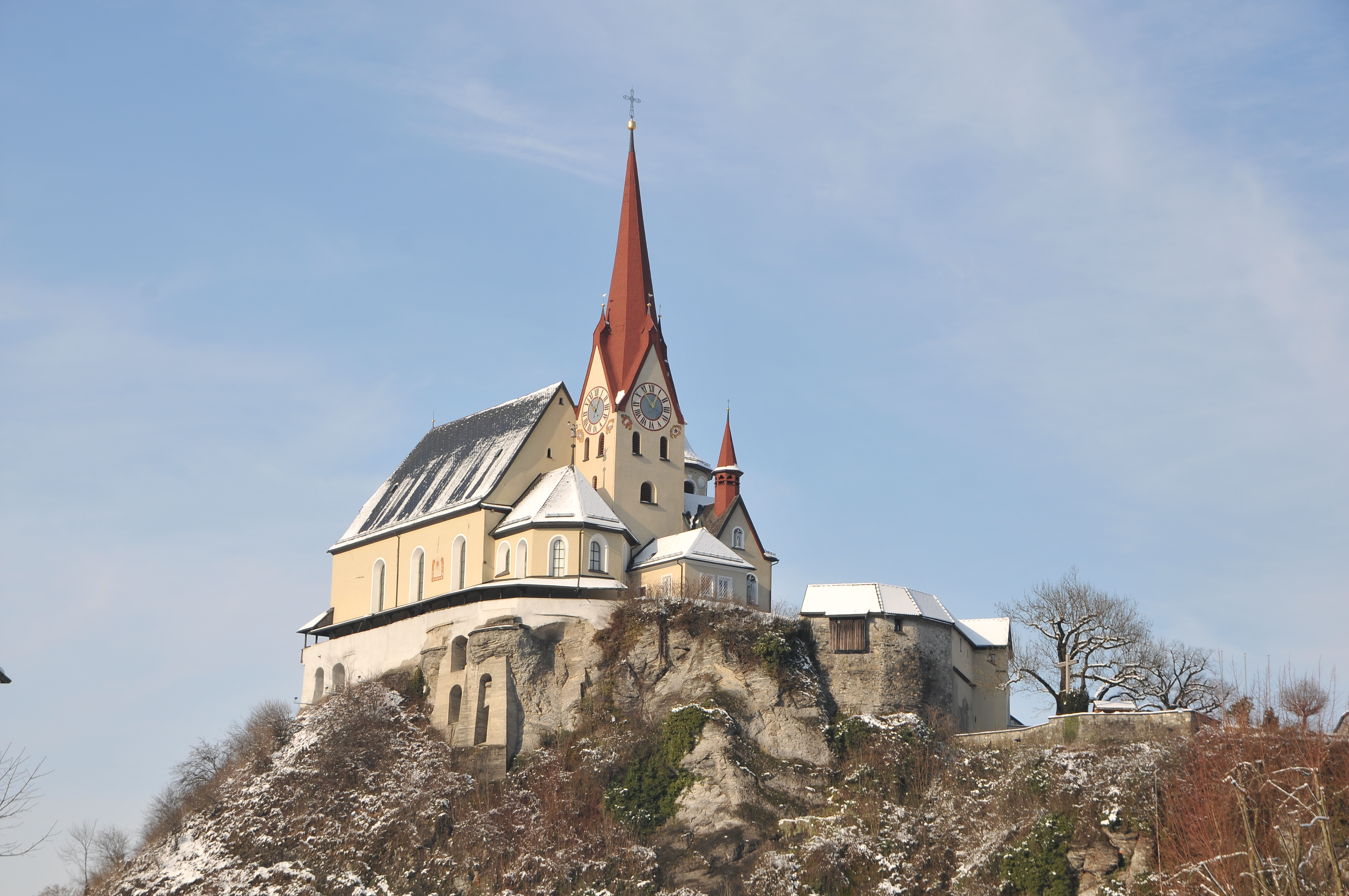 Kath. Pfarrkirche Unsere Liebe Frau Mariä Heimsuchung und Friedhof